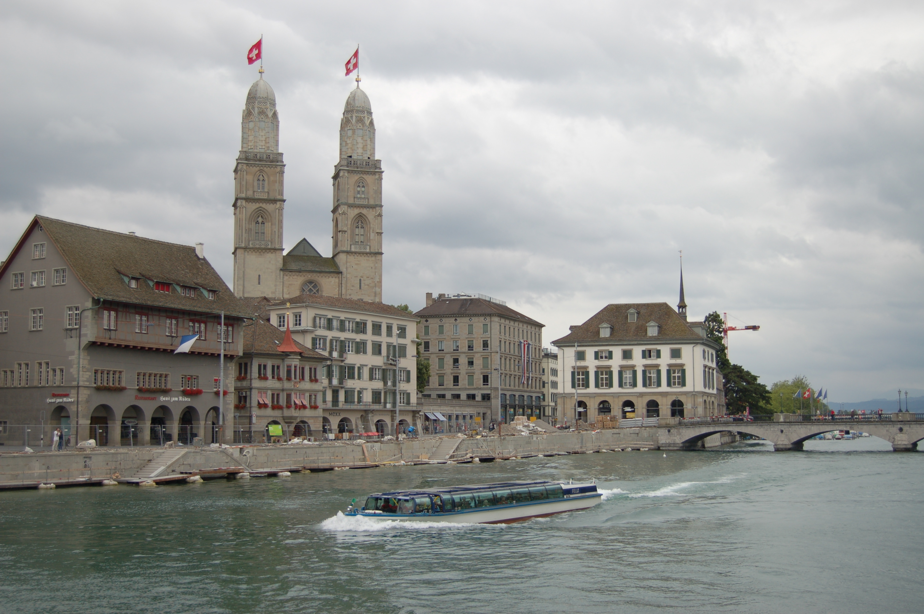 Zürich, Limmat Quai rechtes Ufer